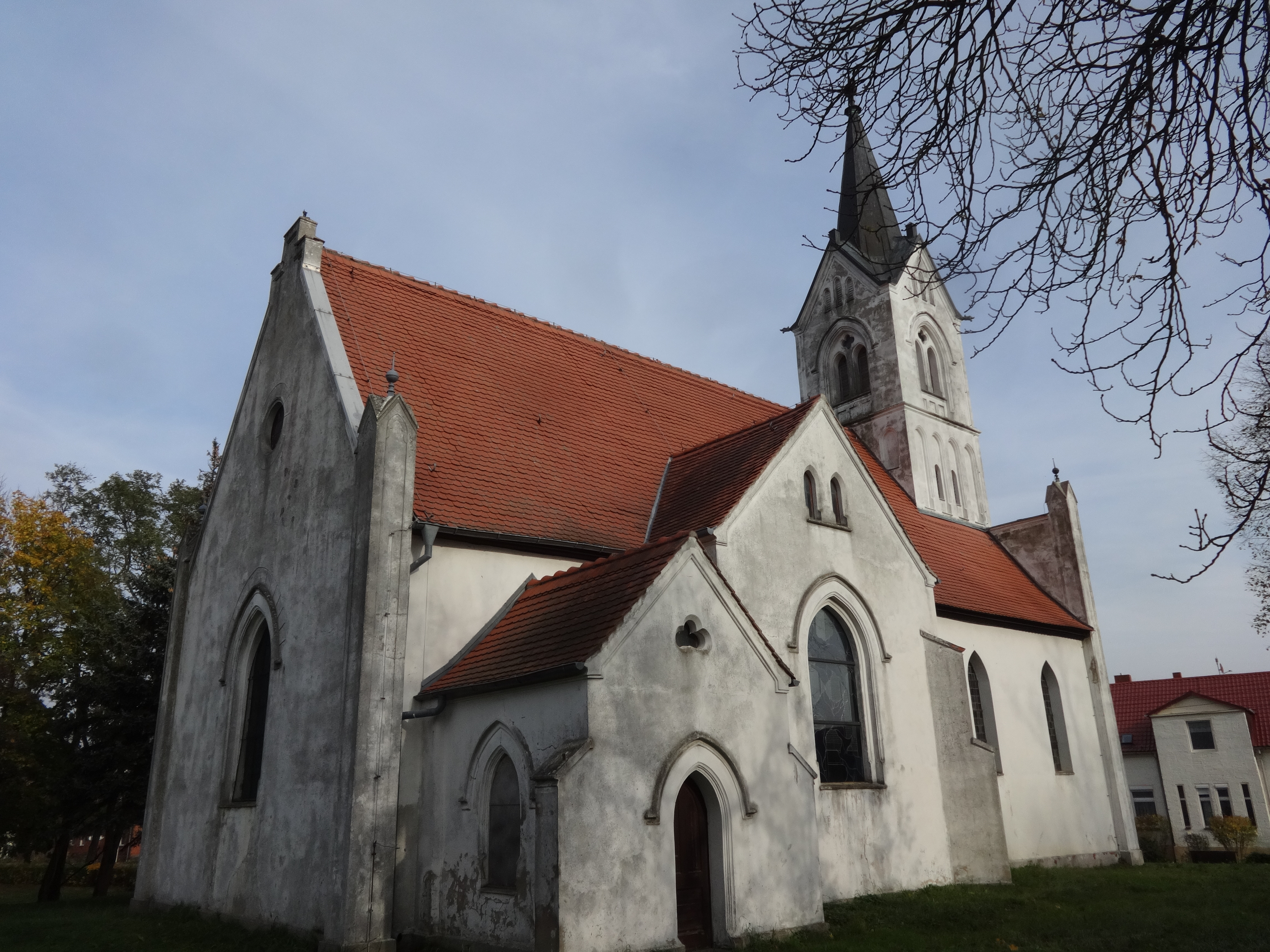 Die Dorfkirche in Trebnitz der Stadt Müncheberg ist eine neugotische Saalkirche, die in den Jahren 1864 und 1865 in der Sichtachse eines Herrenhauses errichtet wurde.